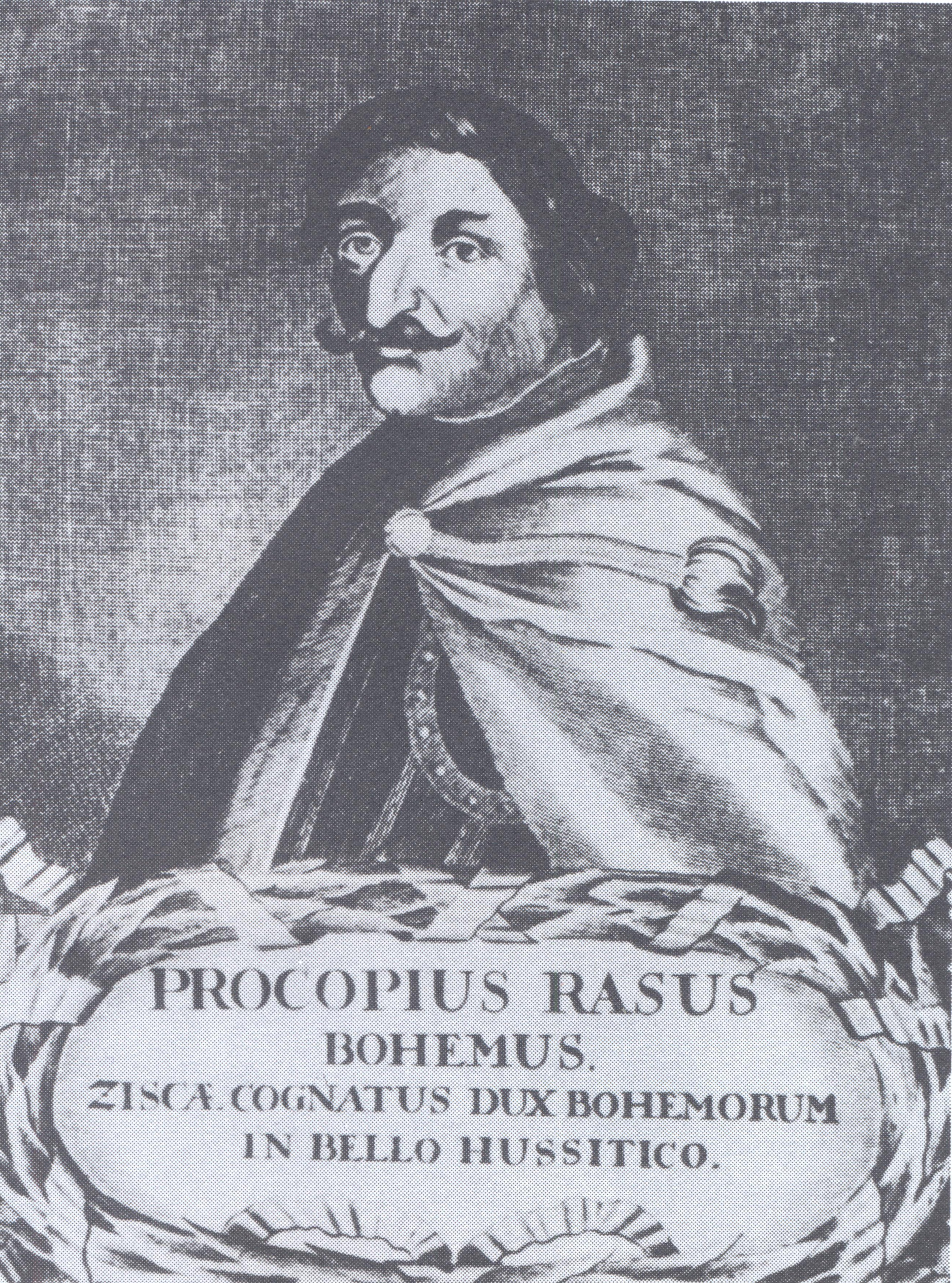 Husitský politik a vojevůdce Prokop Holý (Veliký)